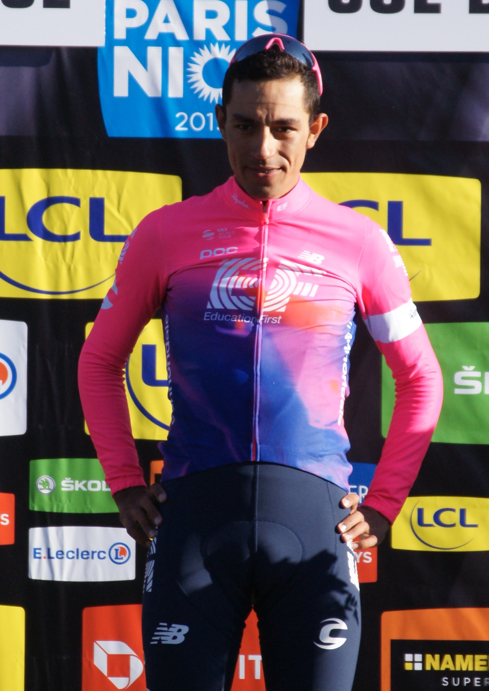 Daniel Felipe Martínez, Paris-Nice 2019